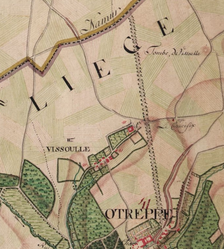 Extrait de la carte de Ferraris n° 135B